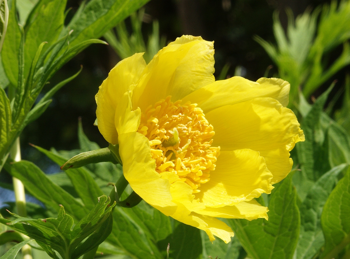 Paeonia ludlowii, garden plant